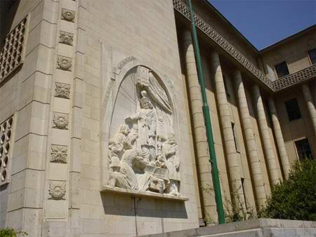 Ministerstvo spravedlnosti v Teheránu - detail